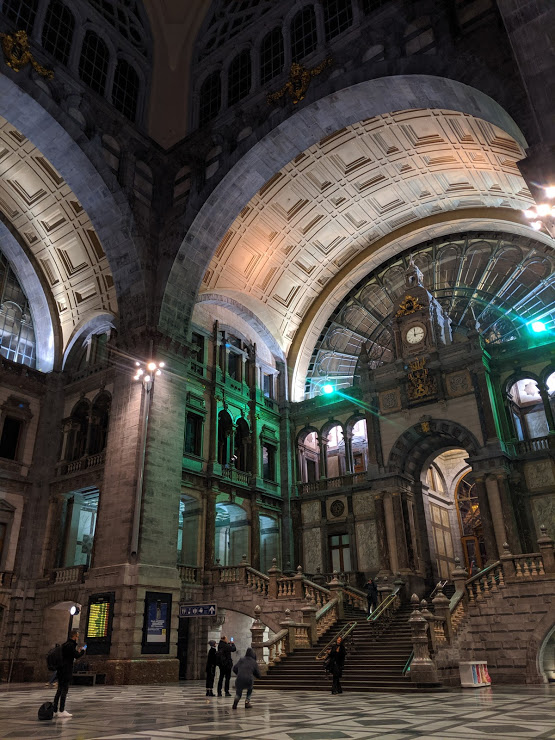 De grote inkomhal van Antwerpen-Centraal station 's avonds net na de laatste trein.